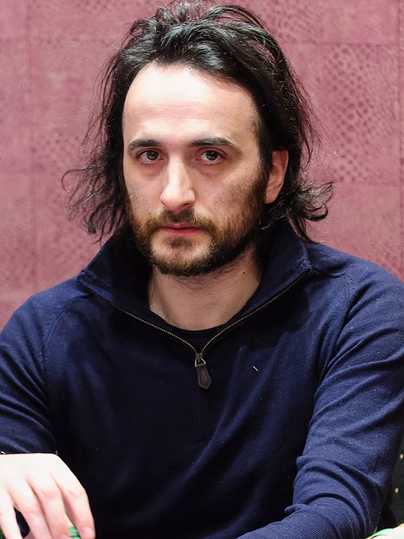 Davidi Kitai im Jahr 2018